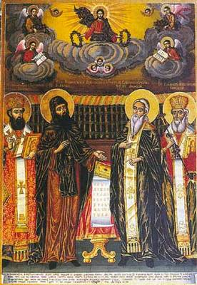 Св.св. Кирил и Методий, св. Климент и епископ Теофилакт от Симеон Молеров 1864 година. Икона от иконната сбирка на Зографския манастир